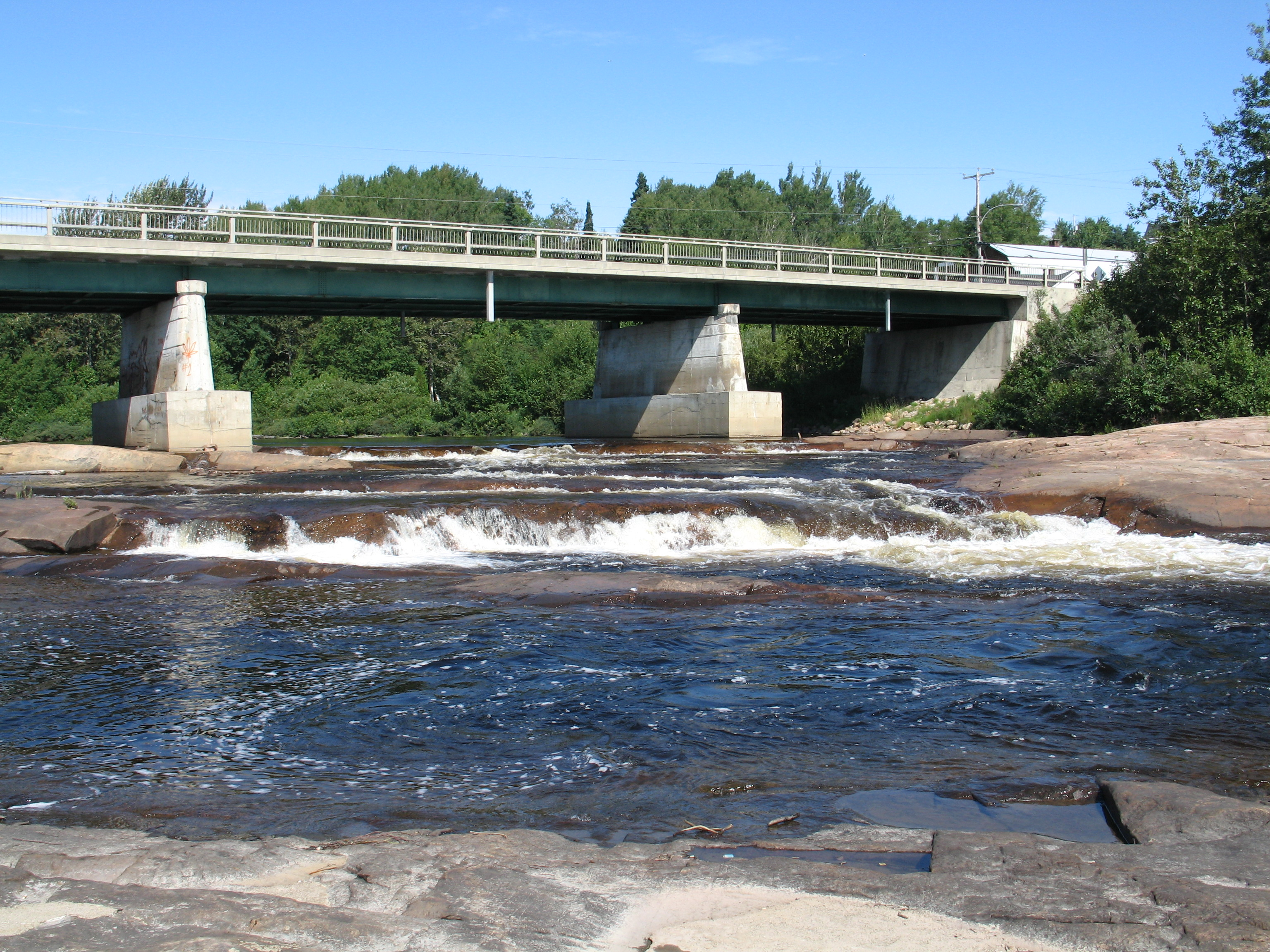 Le Parc des chutes dans le village de Longue-Rive, Québec (partie Sault-au-Mouton)